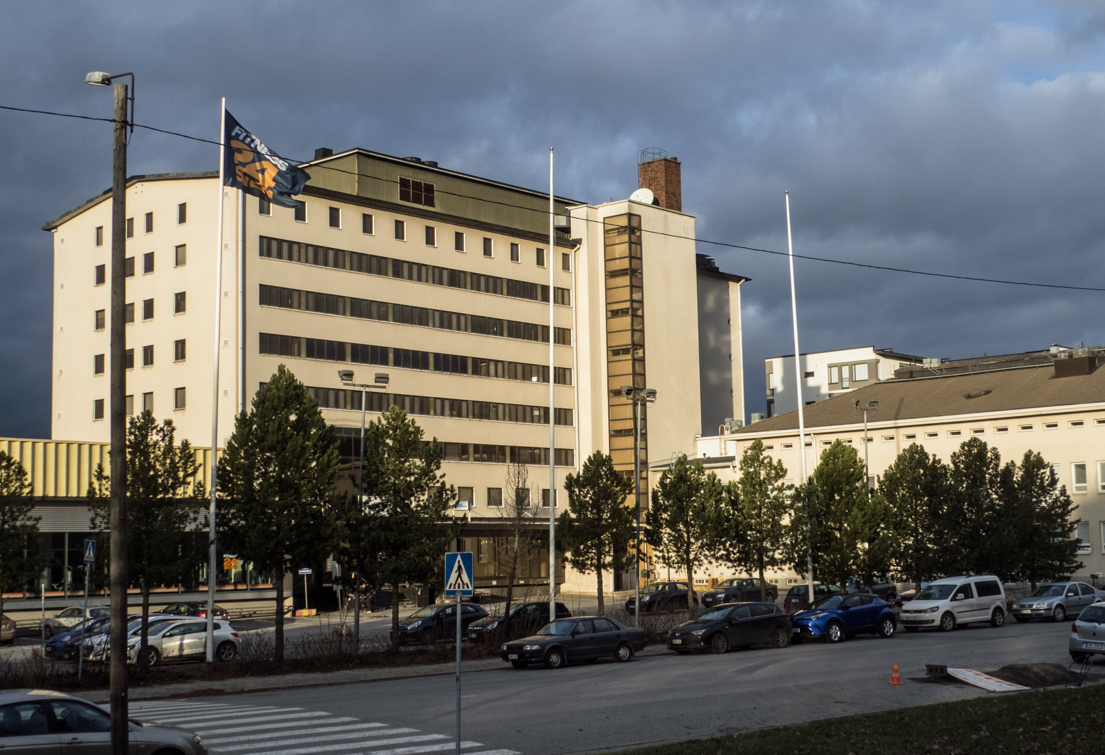 OTK:n entinen leipomo ja varasto Turun Puutarhakadulla. Nyt toimistokäytössä nimellä Hansatorni (seinän valomainoksista päätellen mm. Suomen Henkilöstötalo ja Fonecta).